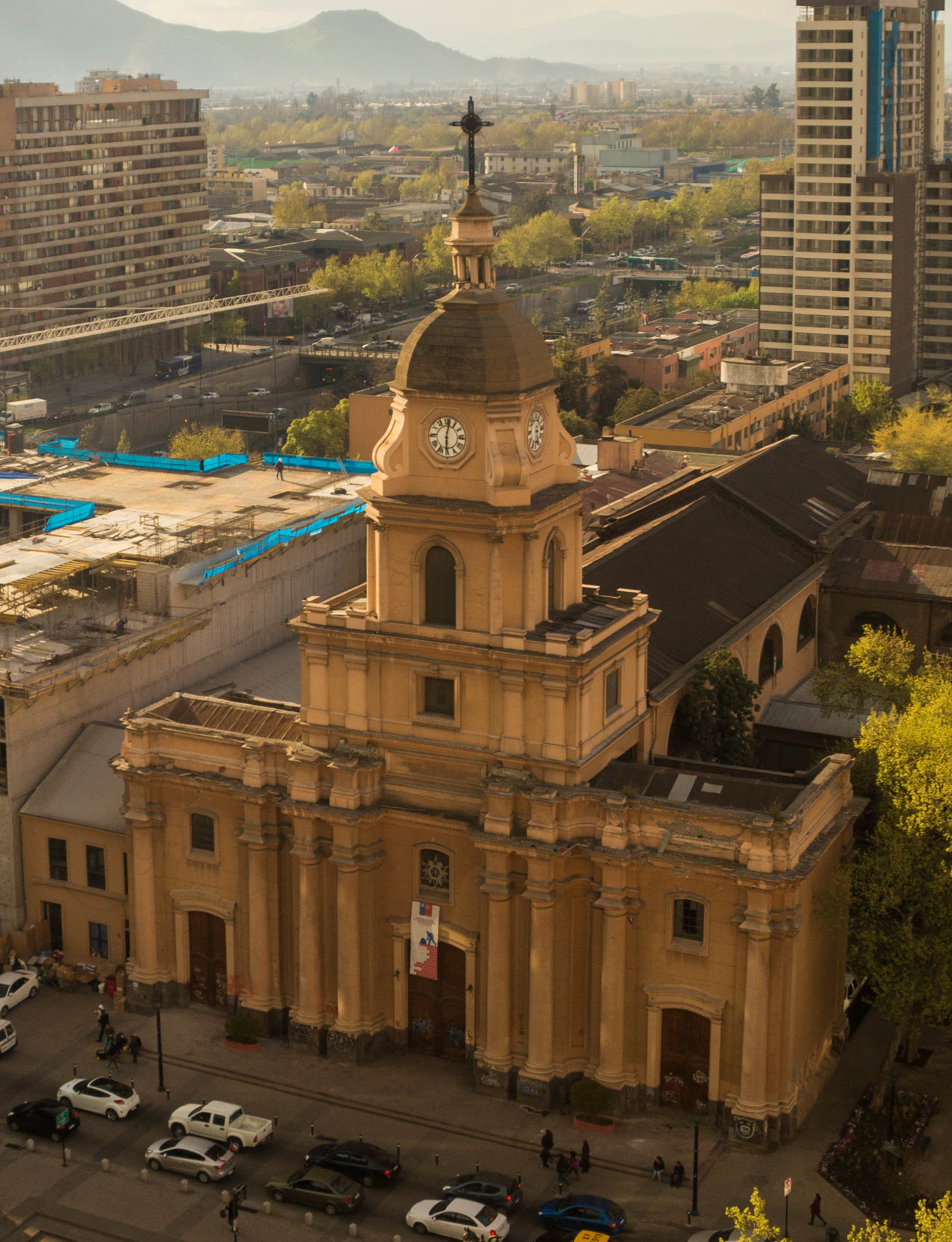 Vista de la Iglesia Santa Ana, monumento nacional. This is a photo of a national monument in Chile: 206